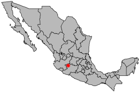 locator map of Zamora de Hidalgo, Michoacán, Mexico